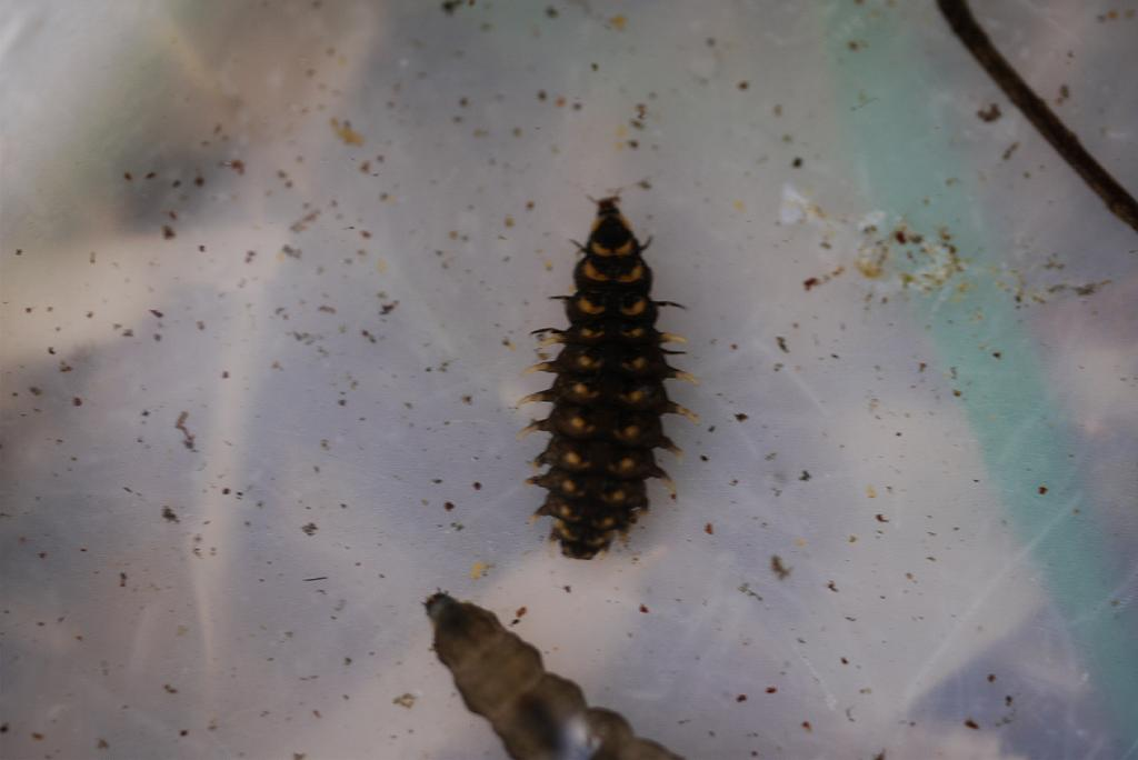 Luciola_cruciata：ゲンジボタル幼虫 2011/02/27 和歌山県田辺市：Tanabe City, Wakayama Pref. Japan